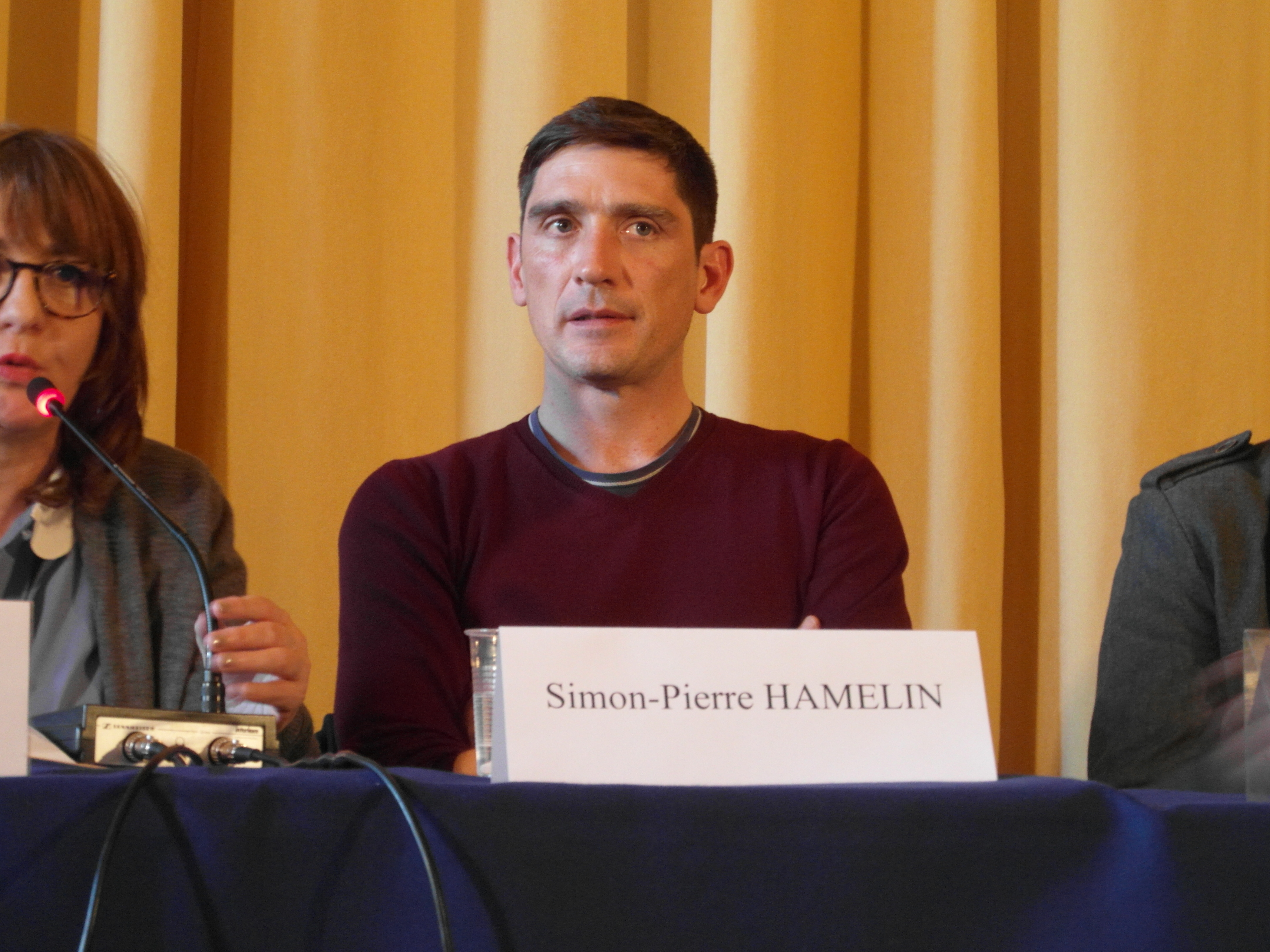 Maghreb des Livres, 7 et 8 février 2015